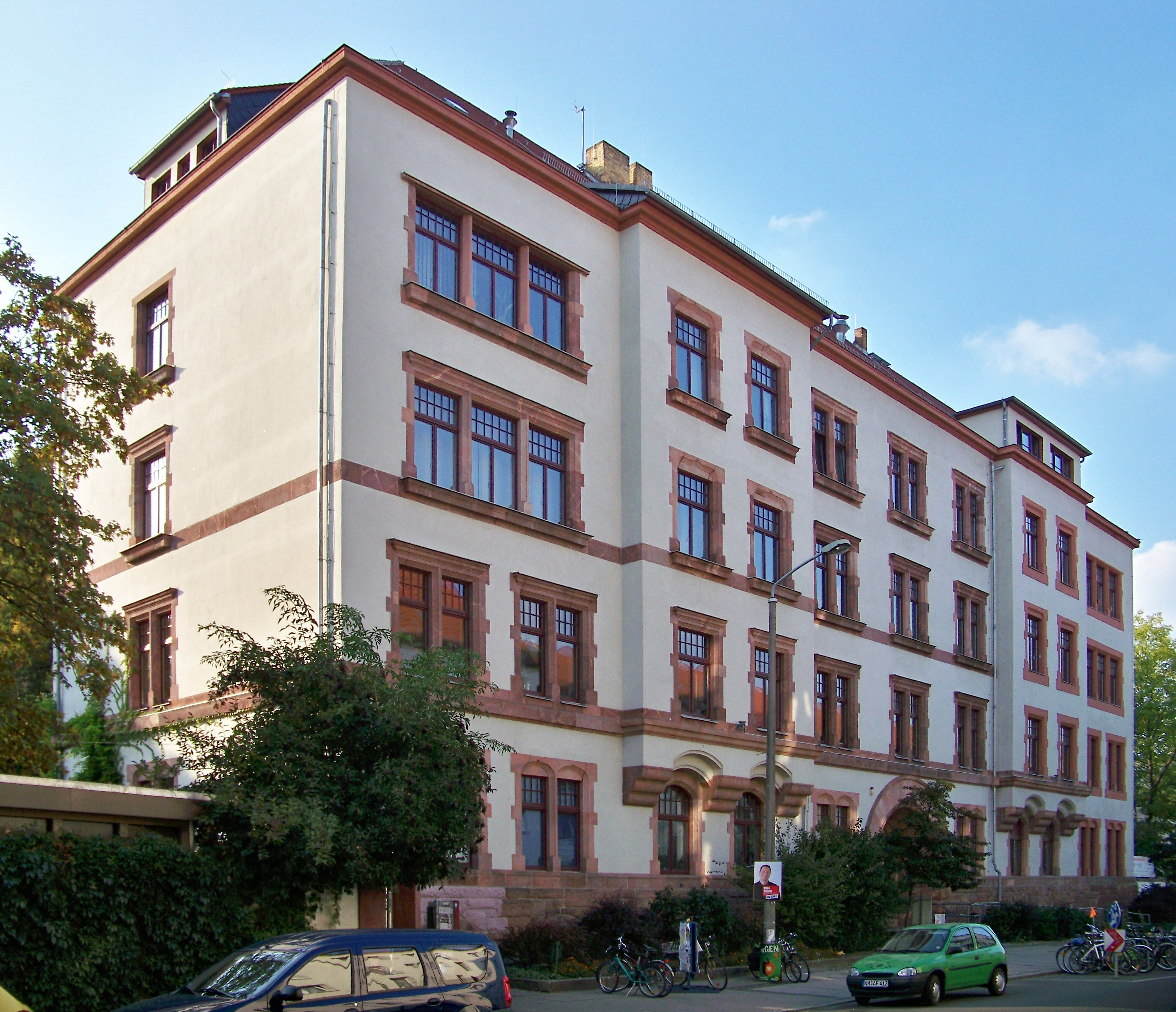 Haus der Demokratie in der Bernhard-Göring-Straße in Leipzig–Connenwitz